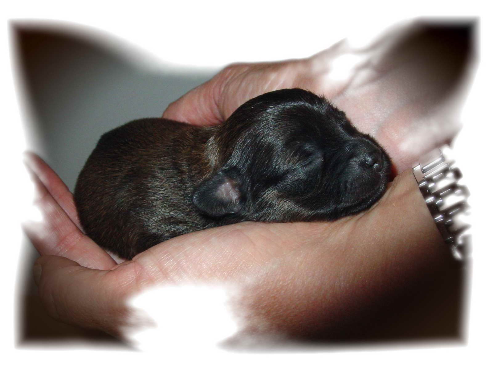 self made. gl: cadeliño palleiro es: perro en: dog